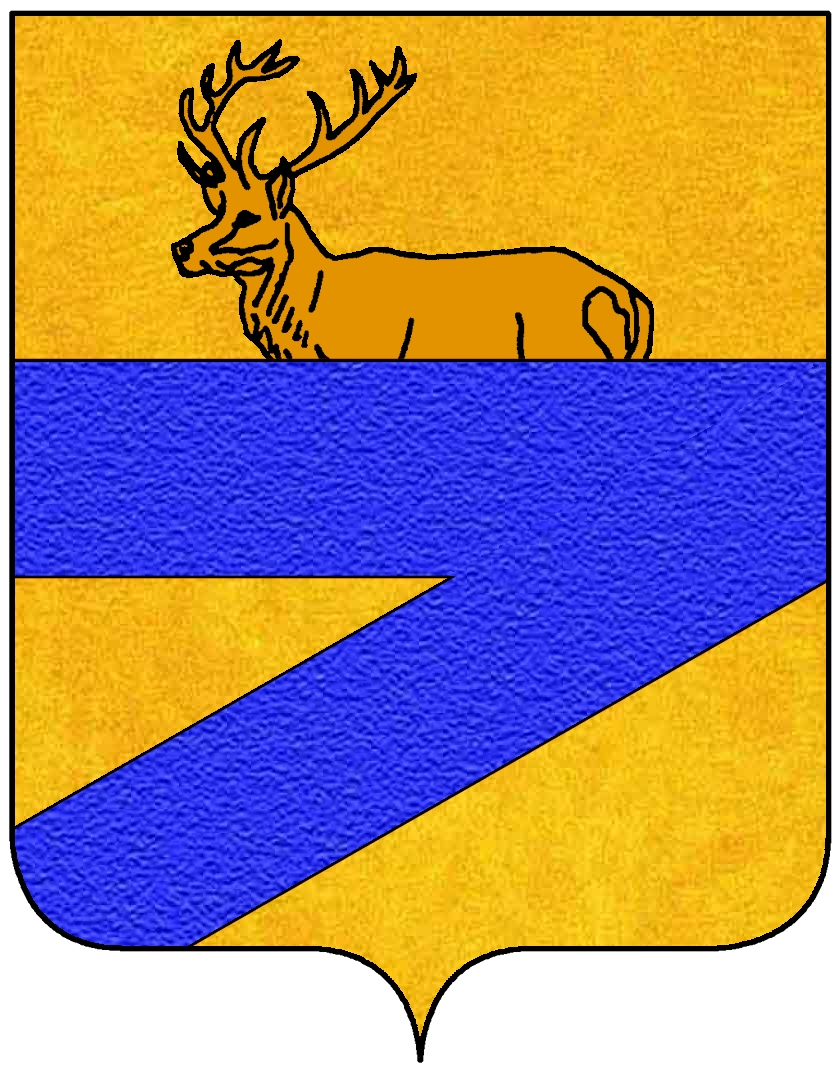 Stemma della famiglia Nobili (Lucca)